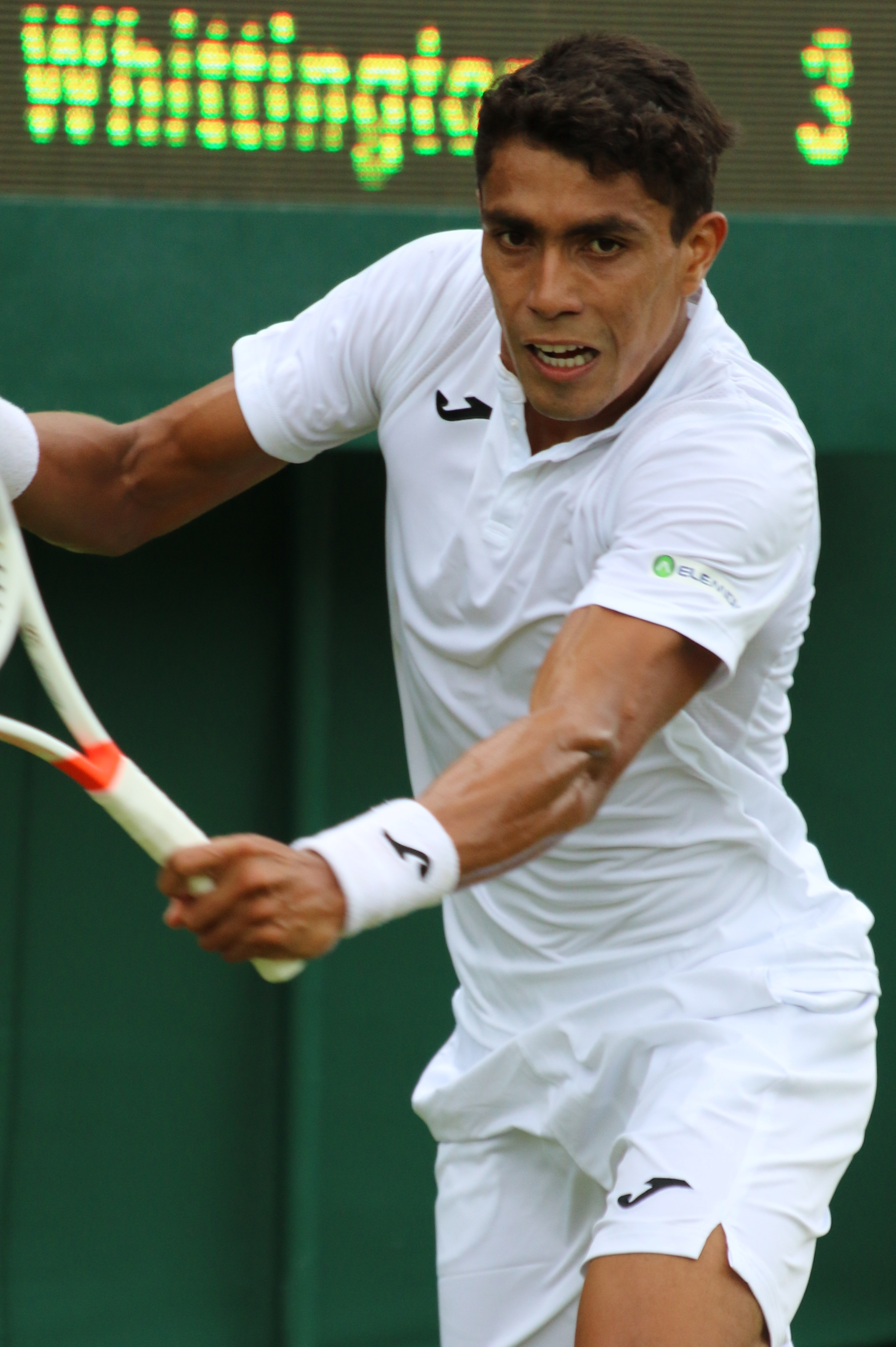 Monteiro WM17 (16)